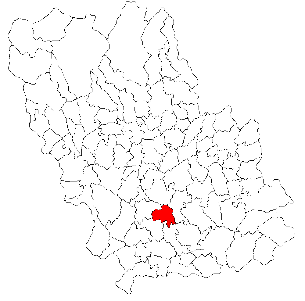 Categorie:Hărţi ale judeţului Prahova